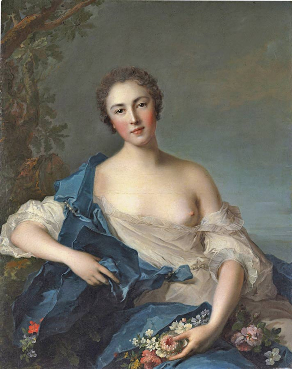 Pauline Félicité de Mailly-Nesle, Comtesse de Vintimille (1712-1741), une favorite de Louis XV, par Jean-Marc Nattier